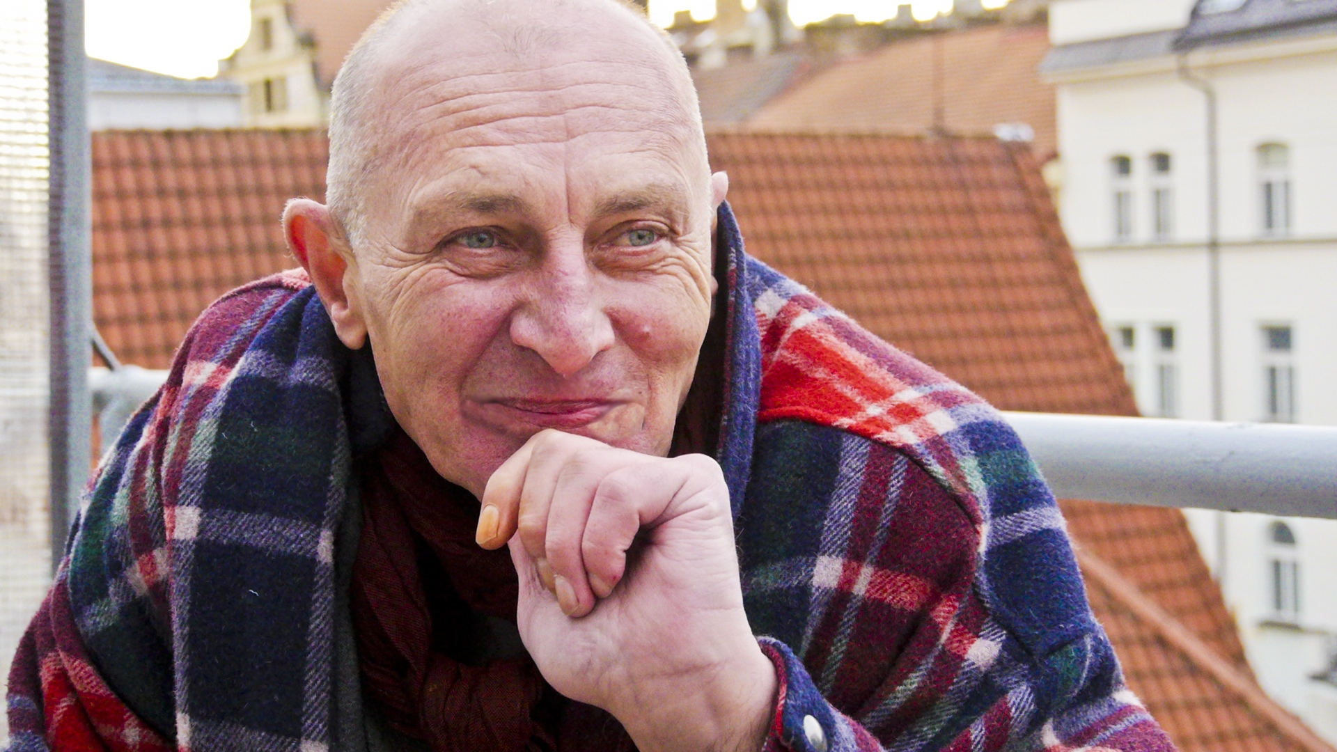 Pavel Zajíček rozveselen